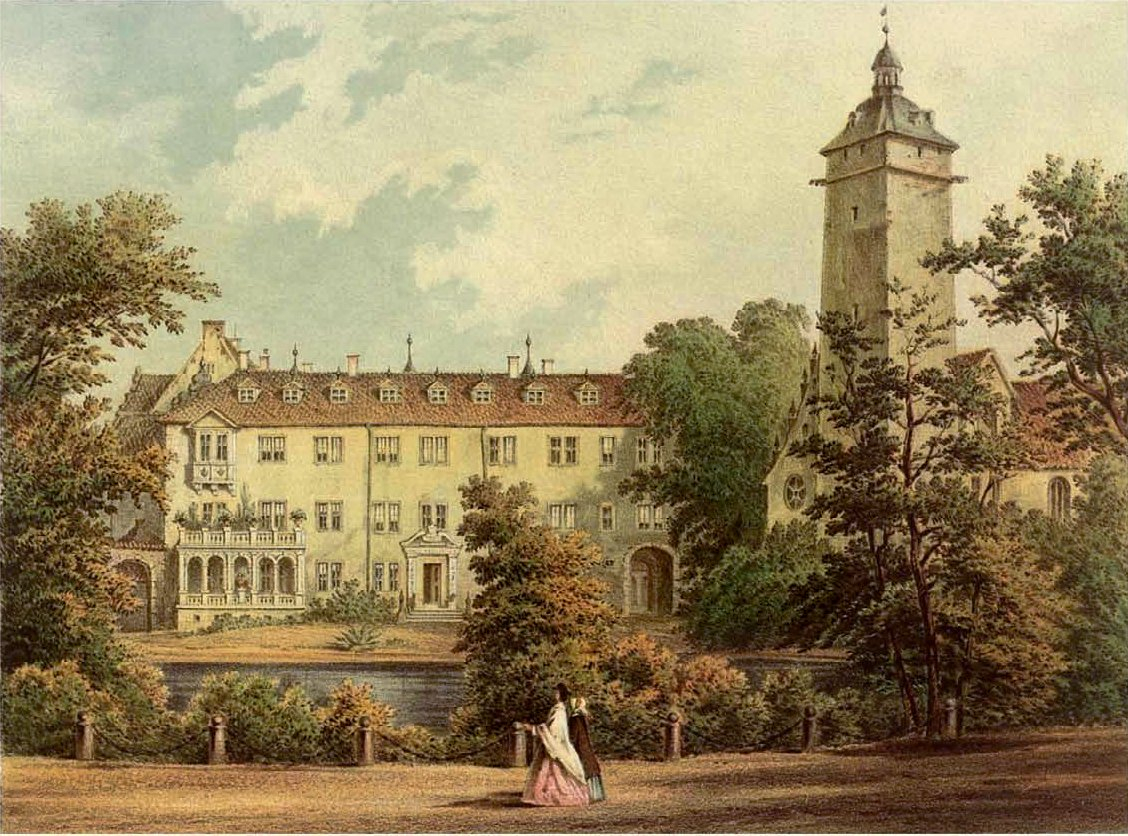 Schloss Erxleben, Kreis Neuhaldensleben, Provinz Sachsen